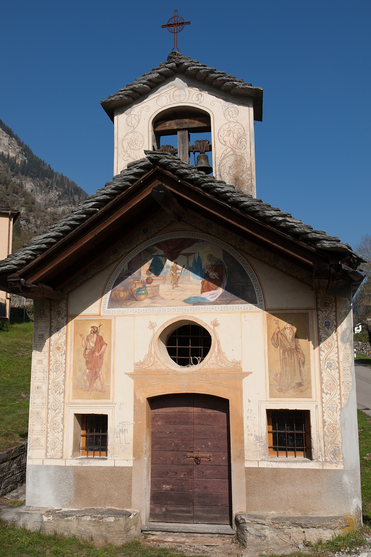 Cappella Madonna di Loreto e di Sant'Anna, Cauco (GR)